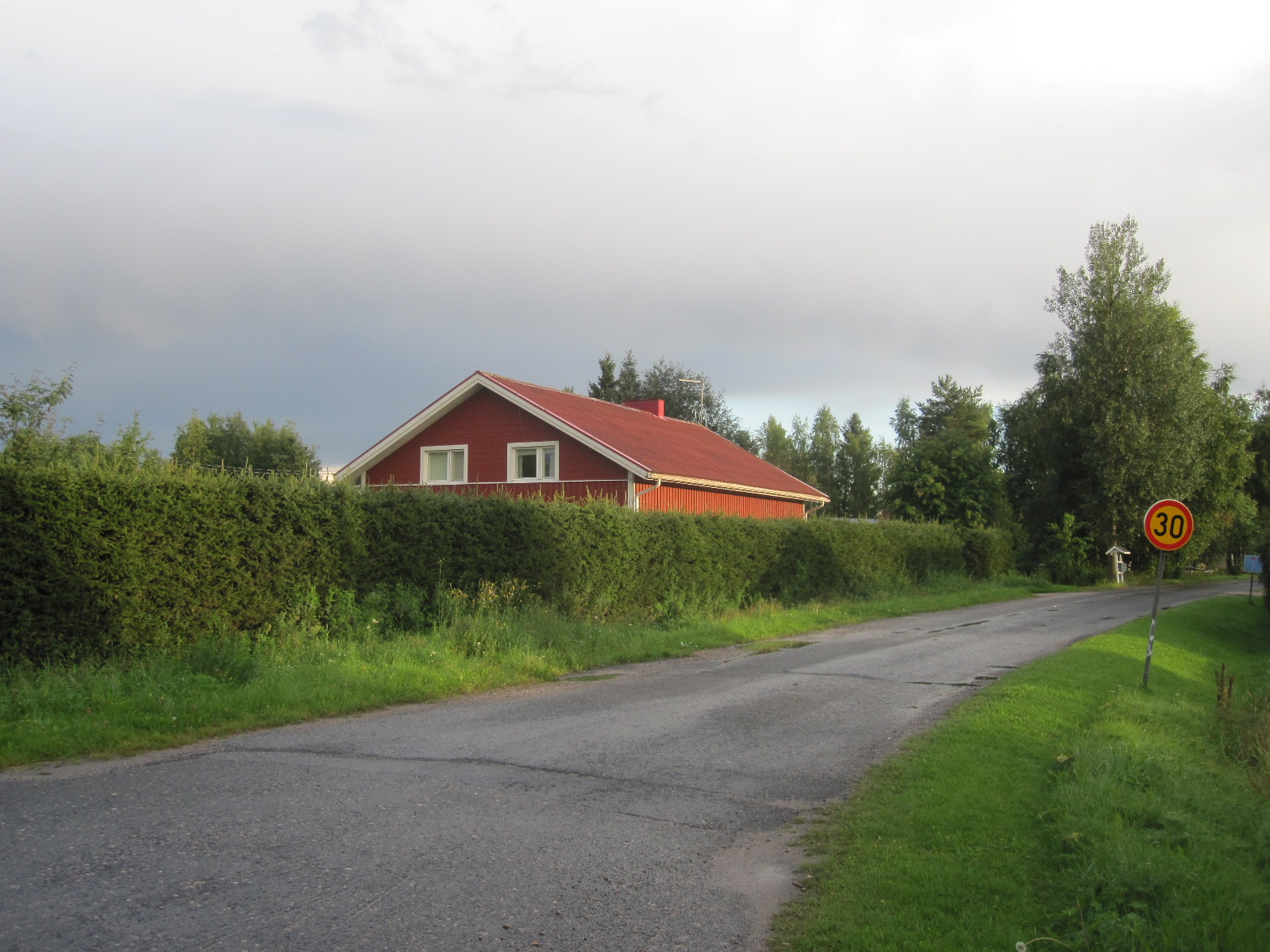 Näkymä Sipolantielle Kempeleen Sipolassa Rajakorventien ja Tuohinontien risteyksessä.